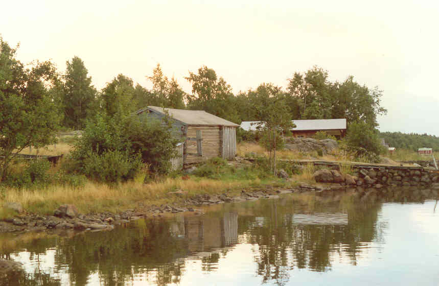 Skaftungs strandlinje, sommaren 1990. Bild tagen av Harri Blomberg.